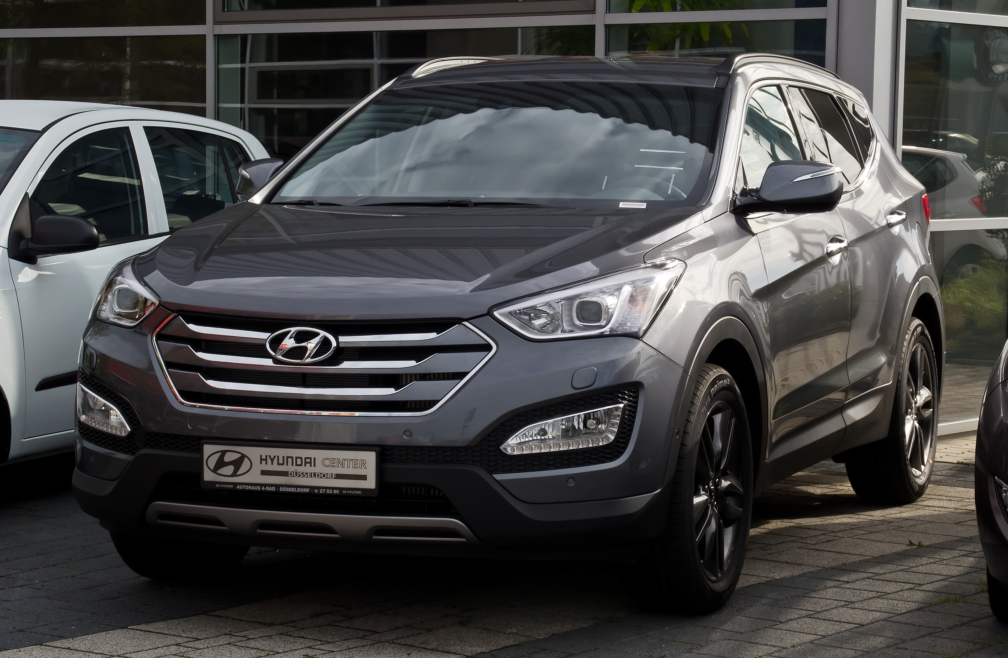 Hyundai Santa Fe (III)